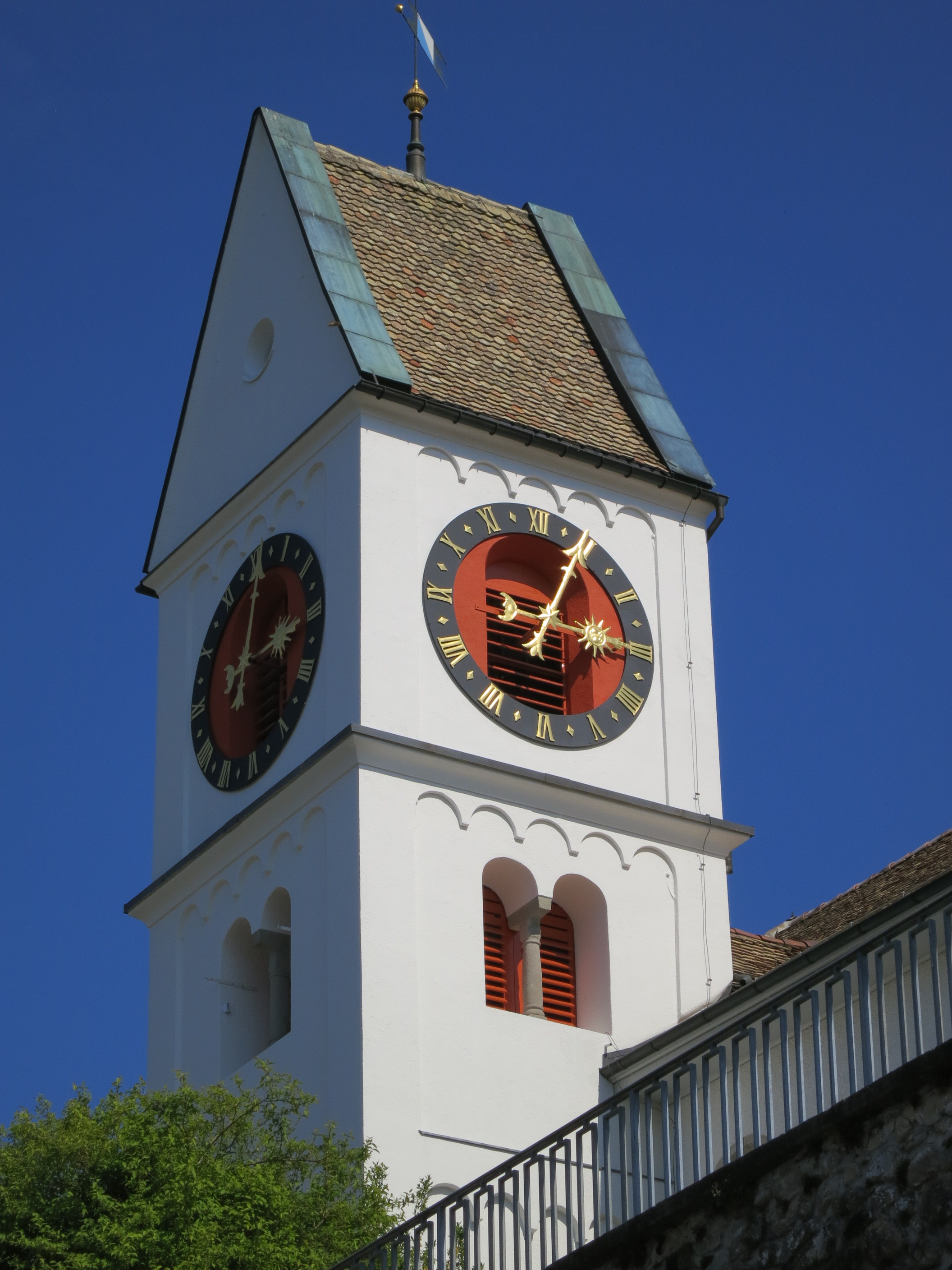 Kirchturm, Birmensdorf ZH, Schweiz